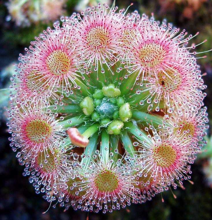 Drosera callistos von oben